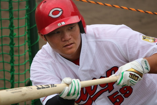 2017/11/7 天福球場